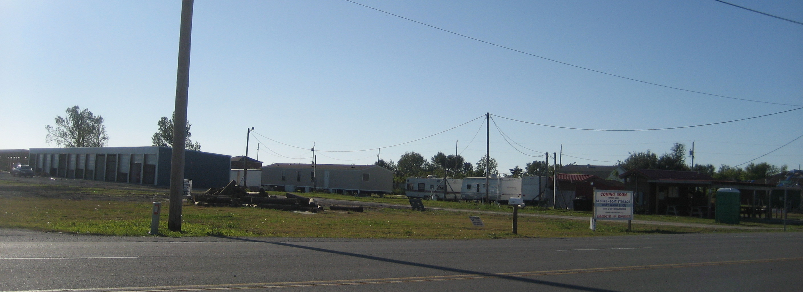 Venice, Plaquemines Parish, Louisiana.